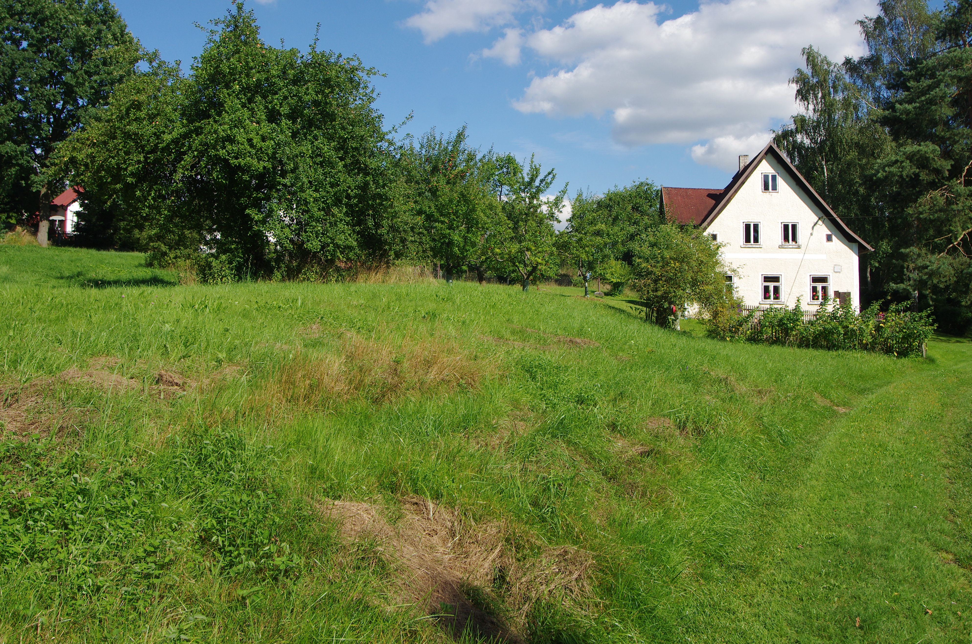 Božetín, místní část obce Nový Kostel, okres Cheb